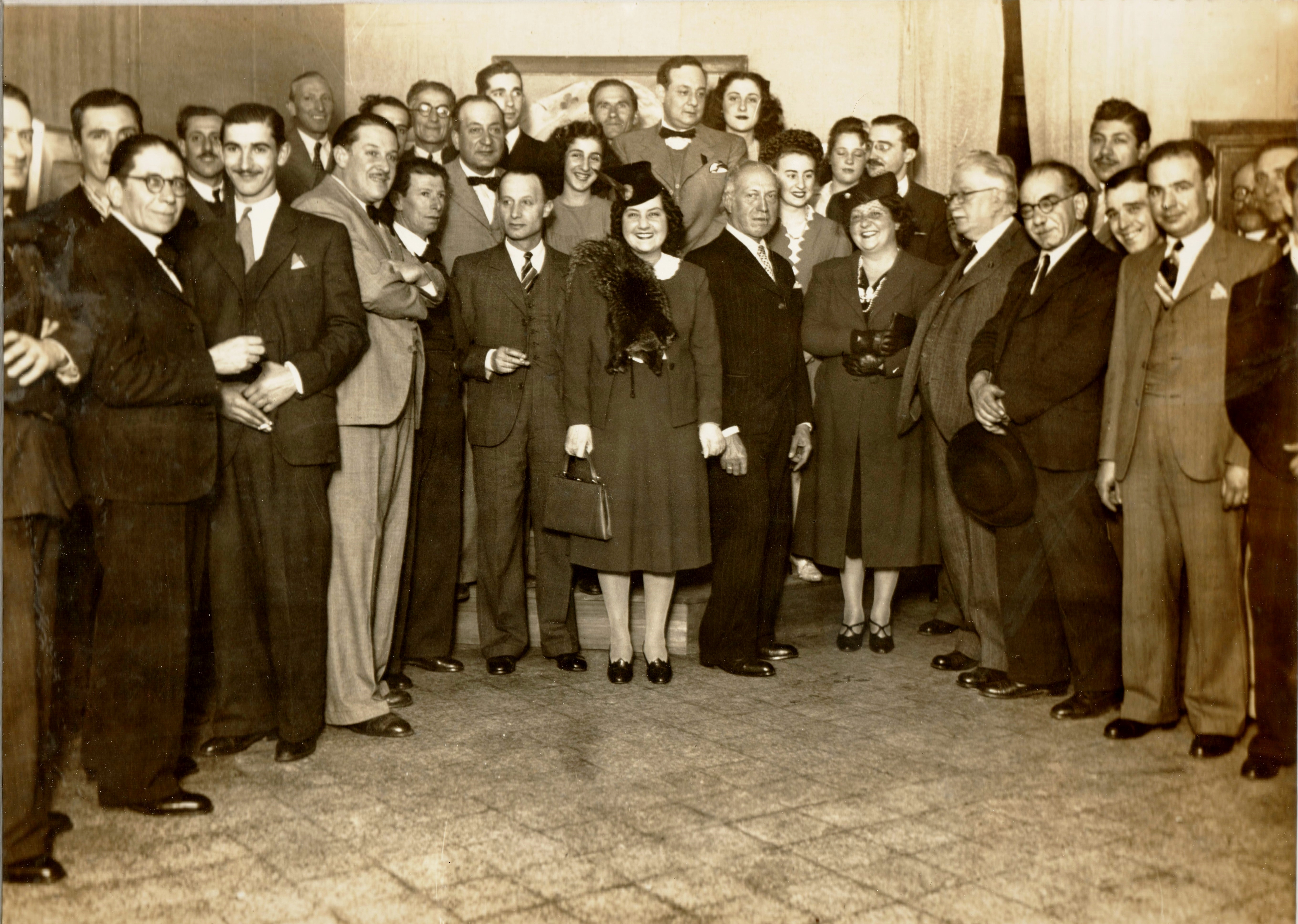 Miraglia en la inauguración de la 1ª muestra individual de Impulso 10-1940